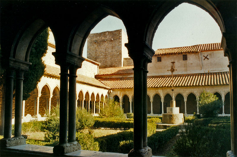 Abadia de Santa Maria d'Arles. Claustre. Vallespir, França